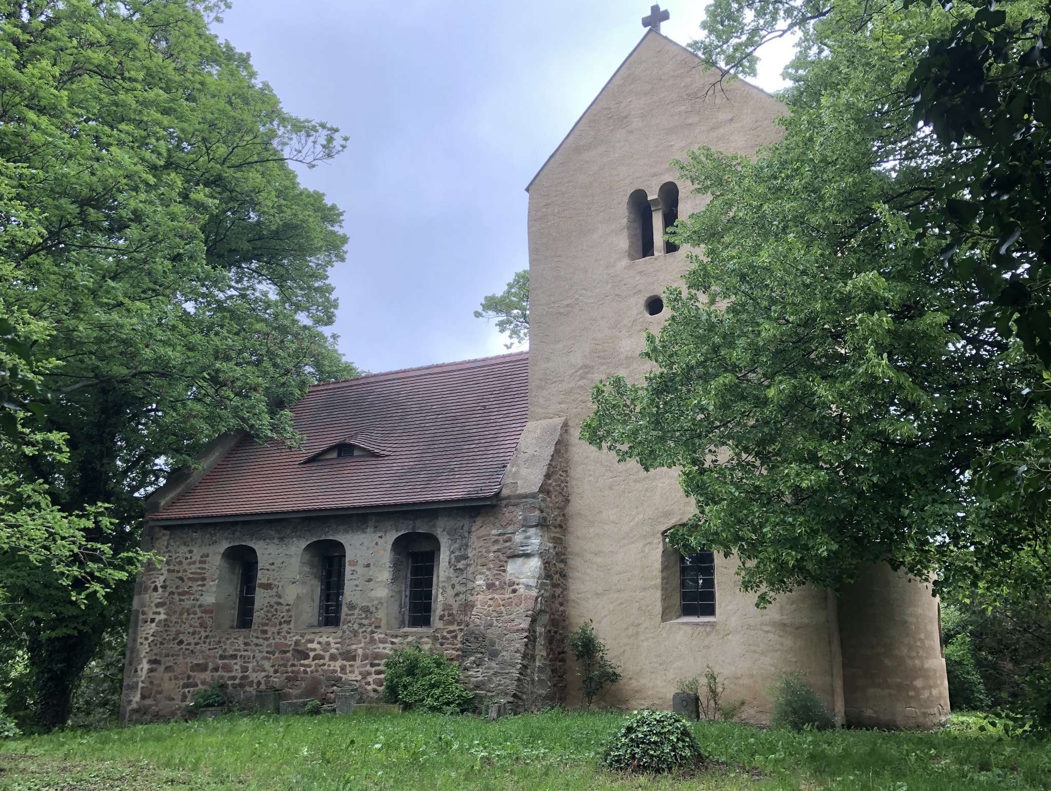 Kirche von Sylbitz